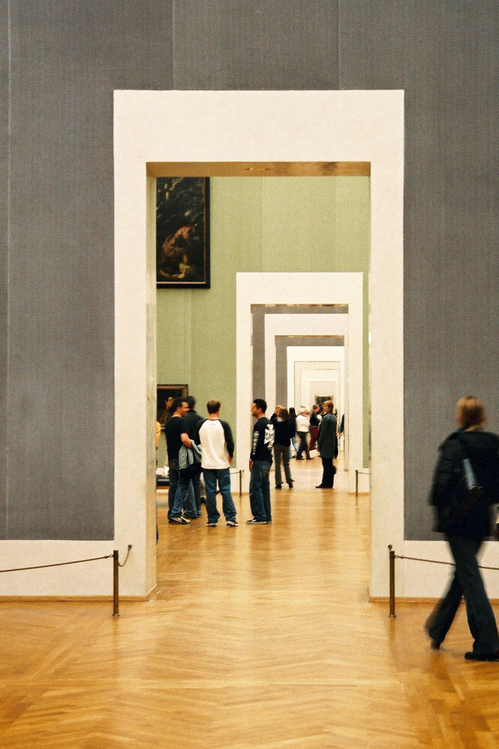 Alte Pinakothek, Munich Interior